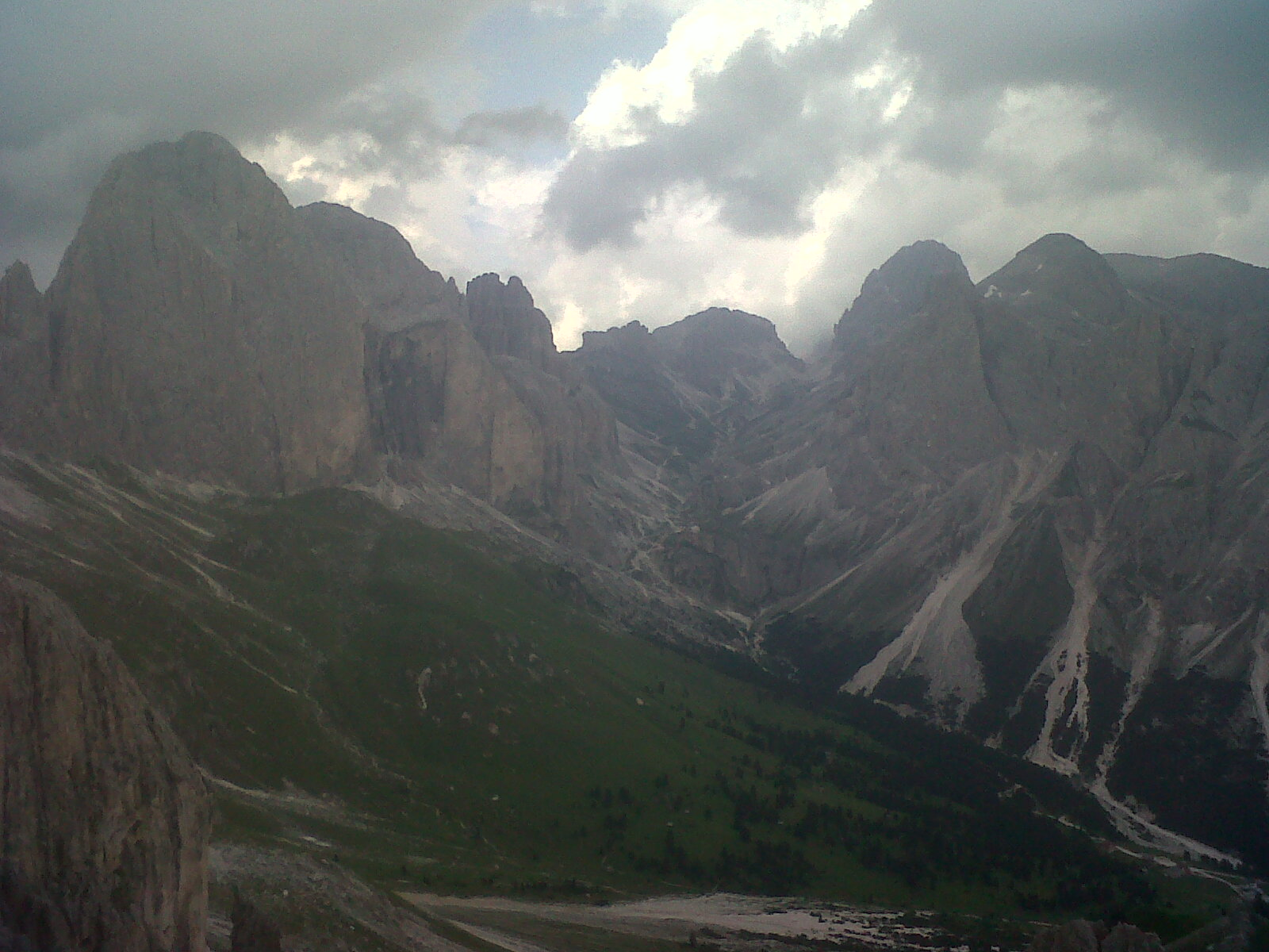 La Valle del Vajolet vista dal Passo delle Scalette.